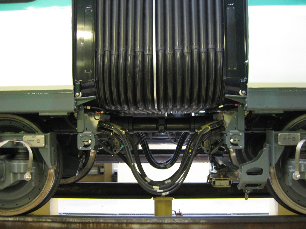 Attelage et intercirculation du MF 2000. JPO Atelier de Bobigny 24/05/2008.